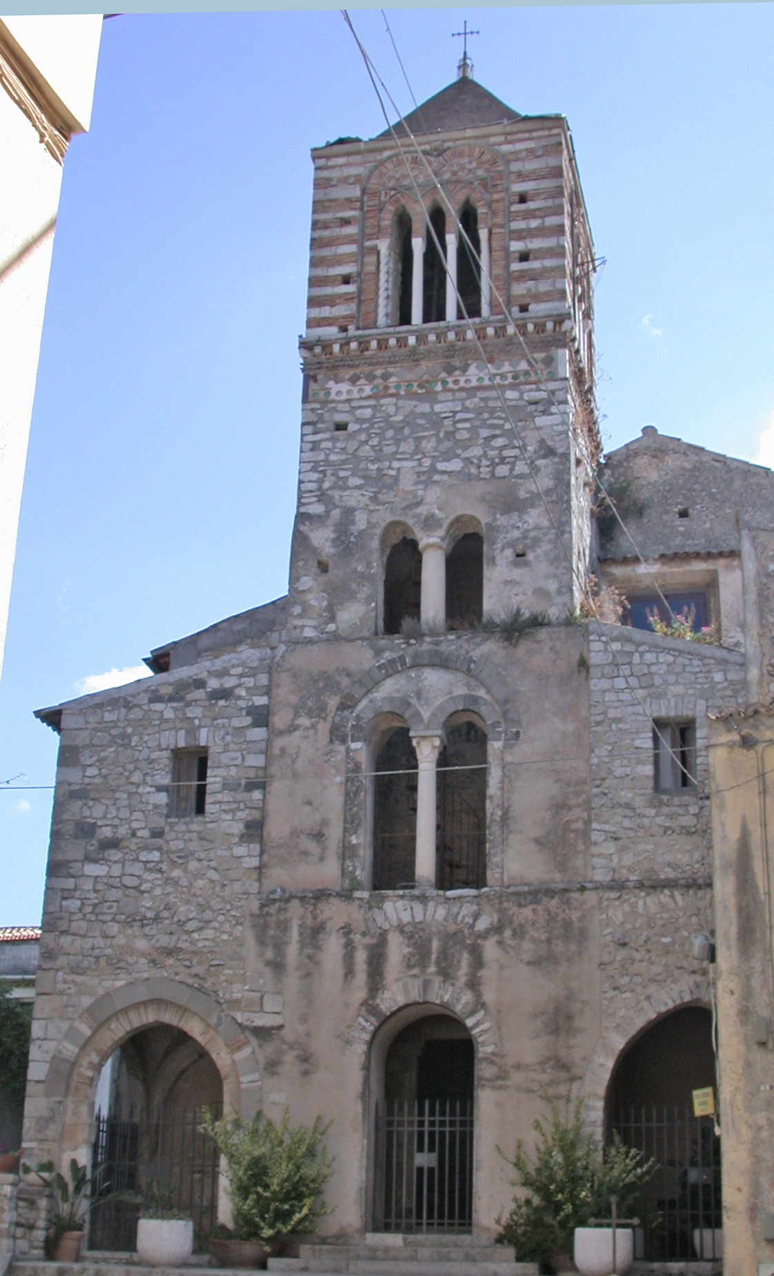 Itri, provincia di Latina, regione Lazio, Italia. Città alta, chiesa di San Michele Arcangelo